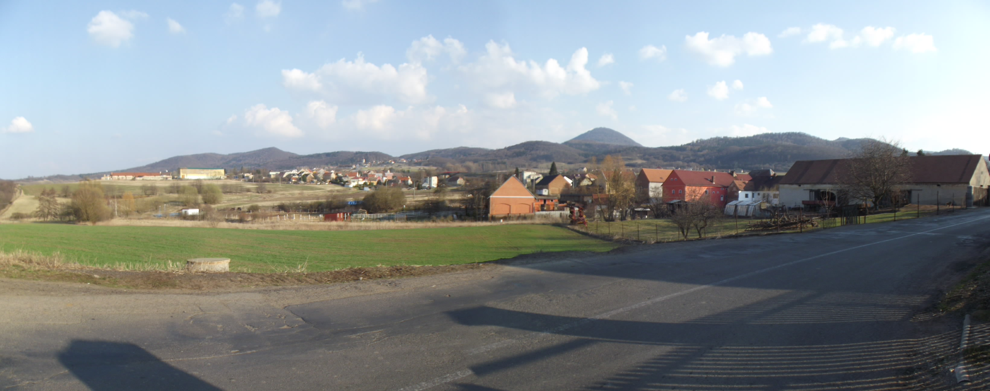 Panoramatická fotografie obce Žalany.